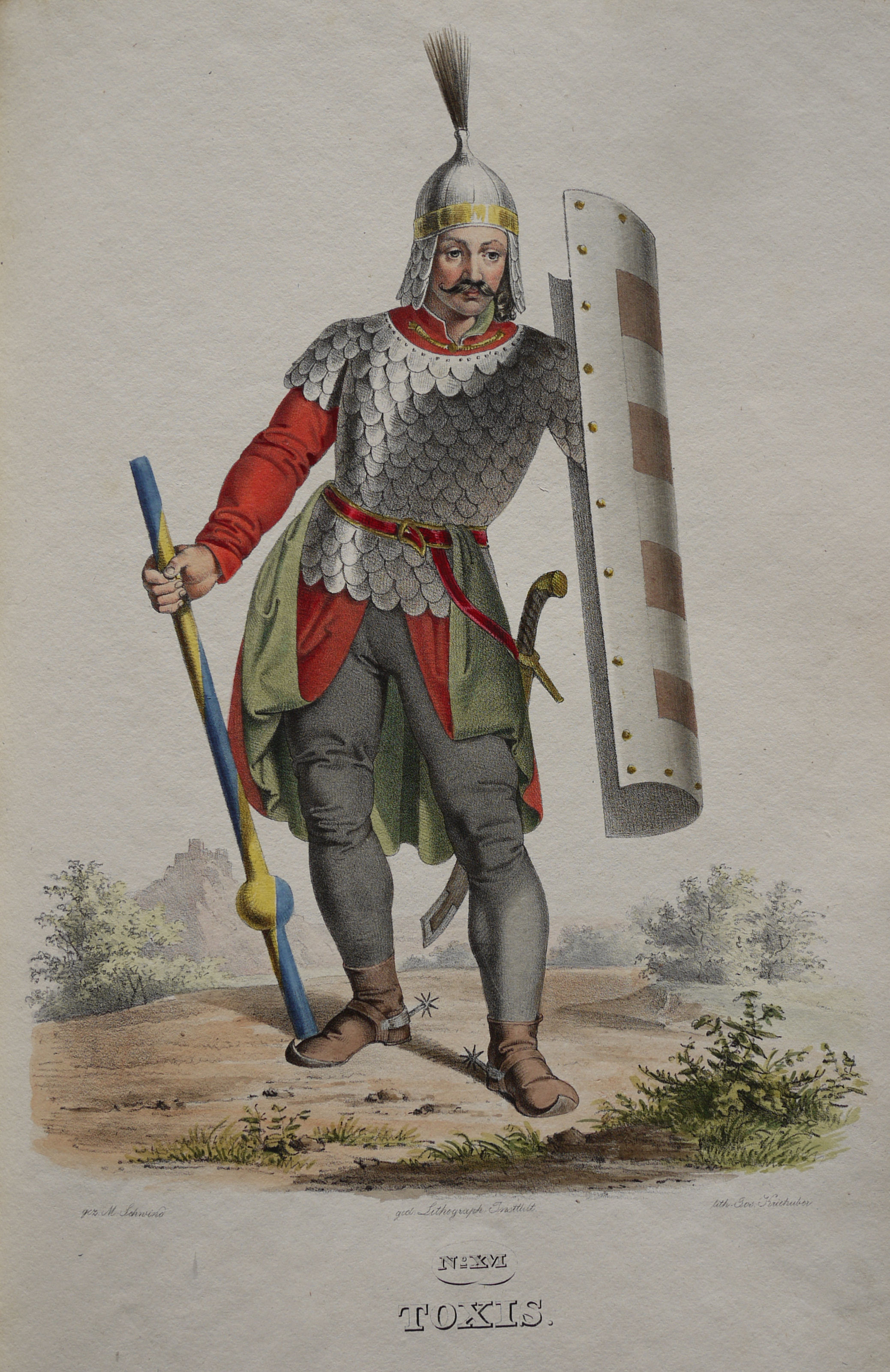 Taksony (931-970), Großfürst der Ungarn, Lithographie von Josef Kriehuber nach einer Zeichnung von Moritz von Schwind aus Ungerns Erste Heerführer Herzoge und Koenige In einer Reihe von Bildnissen von Bela bis auf Seine Majestät Franz I. Kaiser Von Österreich König Von Ungern &c., &c. Wien : Lithographisches Institut ;ca. 1828